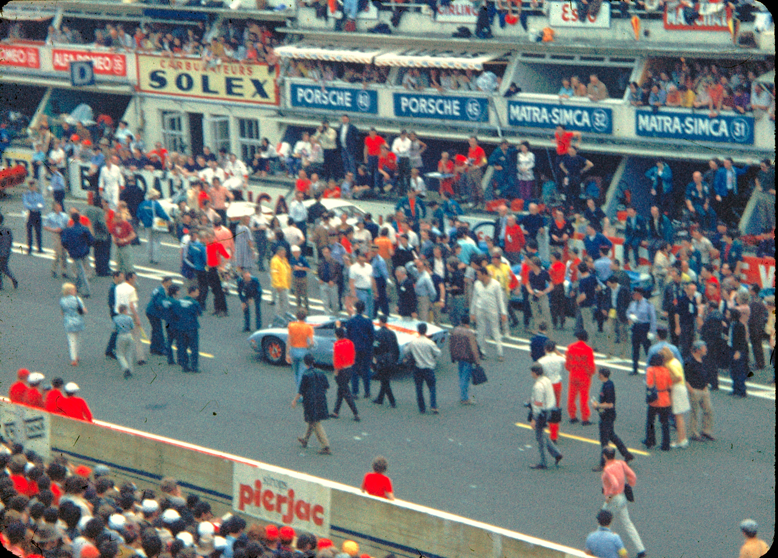 Tournage du film Le Mans avec Steve McQueen lors de l'édition 1970 des 24 Heures du Mans.